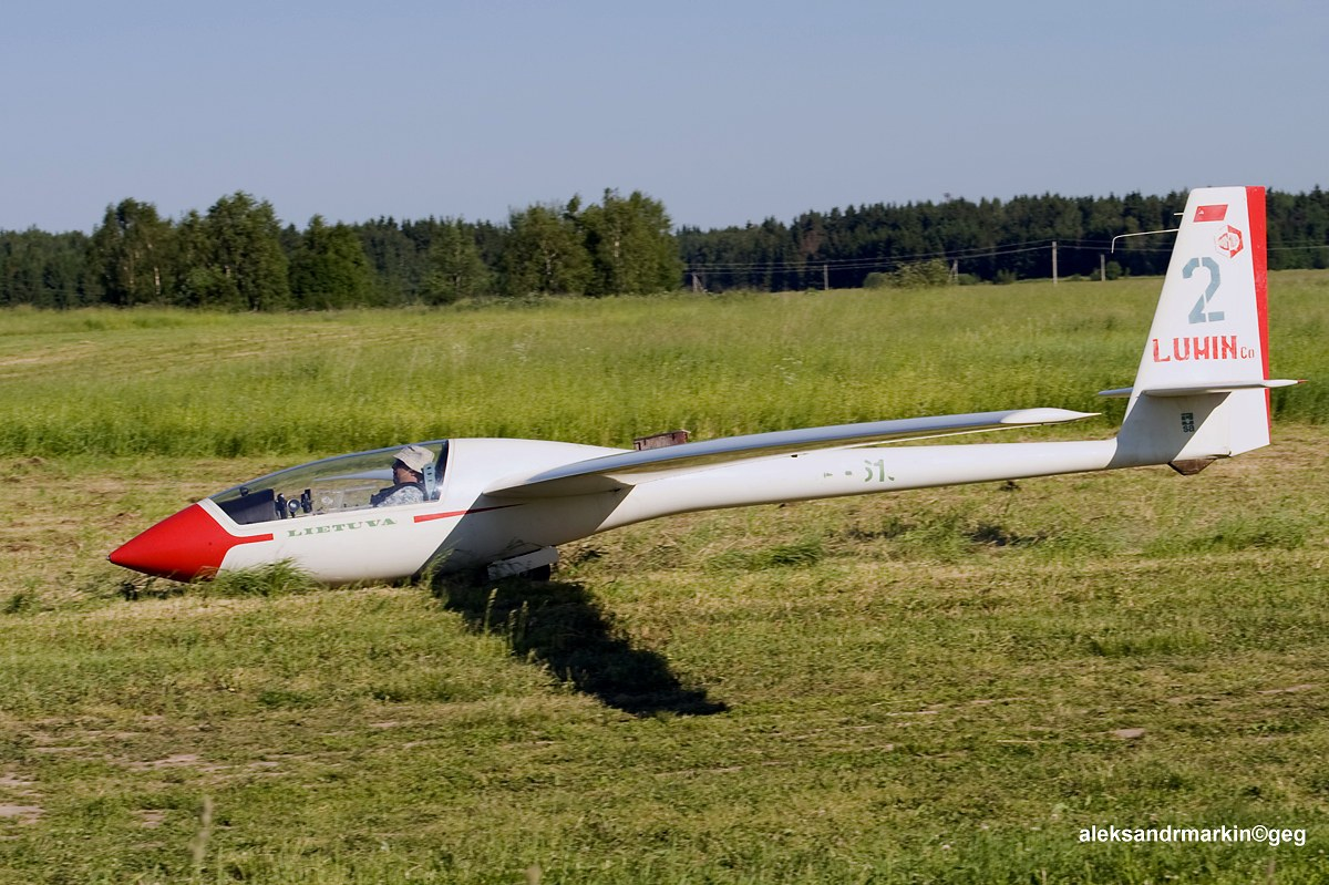 Landing glider "Sportine Aviacija LAK-12 Lietuva"